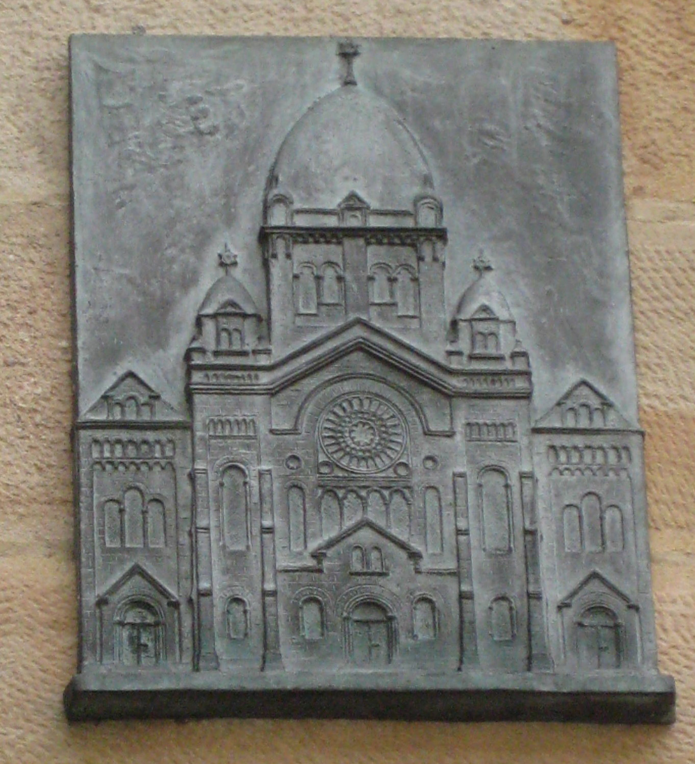 Hinweis auf die Alte Synagoge in Osnabrück